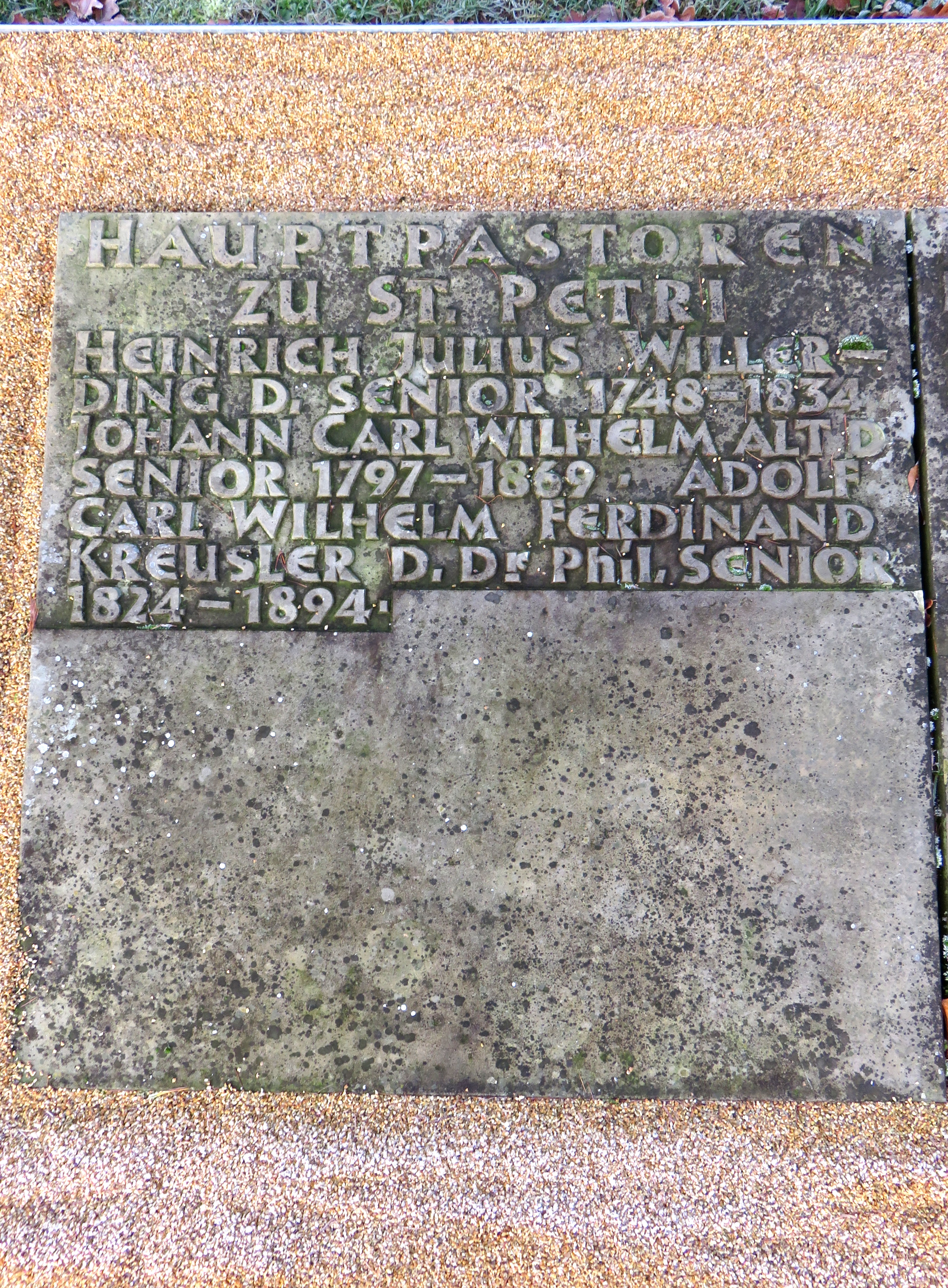 Doppelsammelgrab Hauptpastoren zu St. Petri / Pastoren zu St. Petri im Bereich des Althamburgischen Gedächtnisfriedhofs auf dem Hamburger Friedhof Ohlsdorfzu Ehren von unter anderen Johann Karl Wilhelm Alt, Adolf Kreusler, Johann John, Valentin Anton Noodt, Johann Anton Rudolph Janssen.